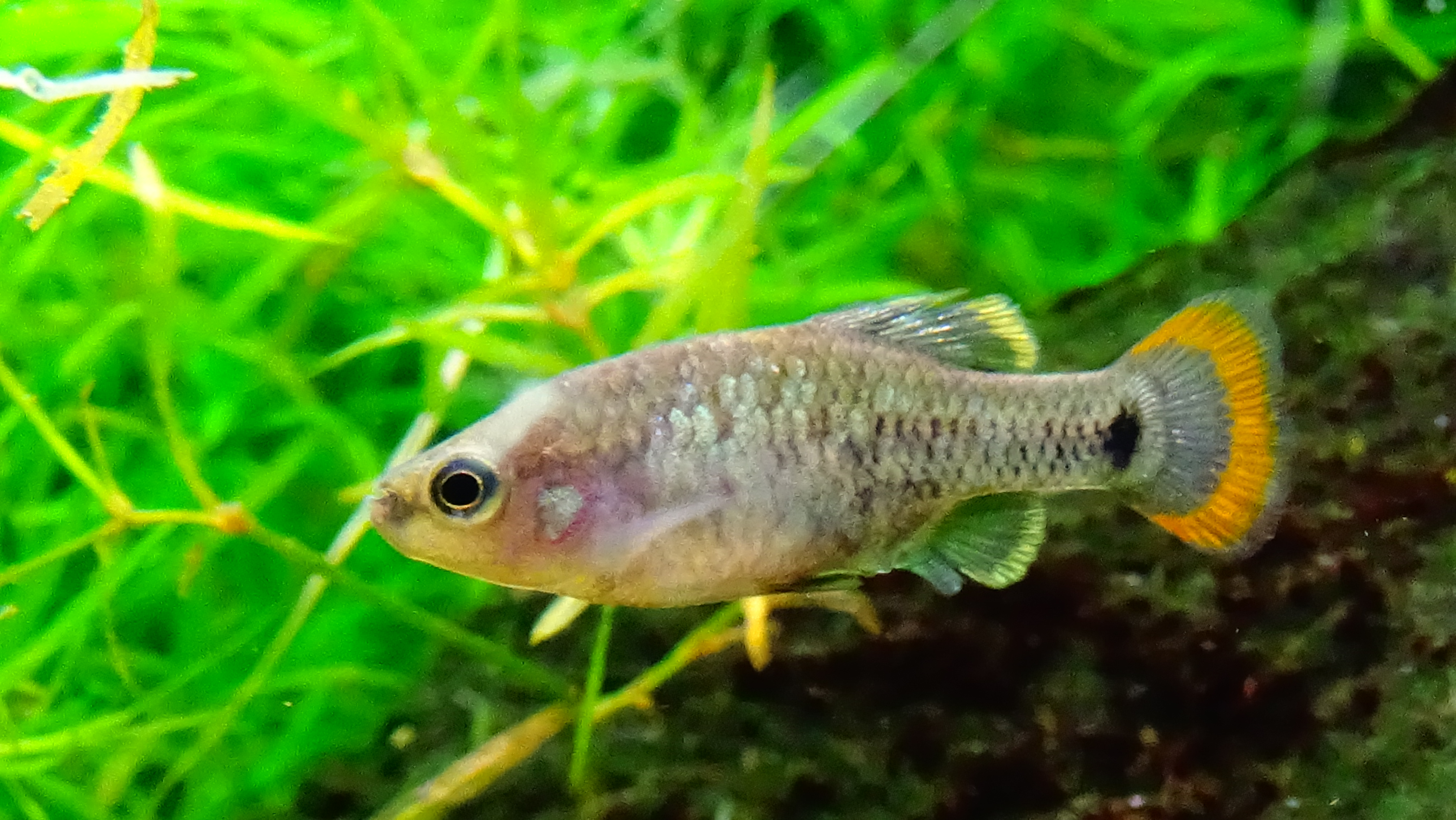 Zoogoneticus tequila - Aquarium Tropical du Palais de la Porte Dorée - Paris/France - 29/04/2015